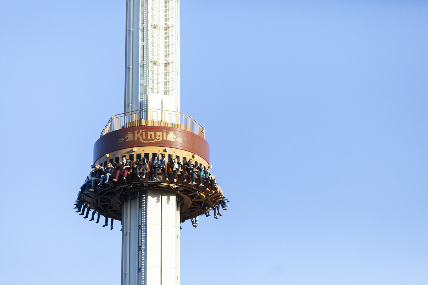 Linnanmäen Kingi